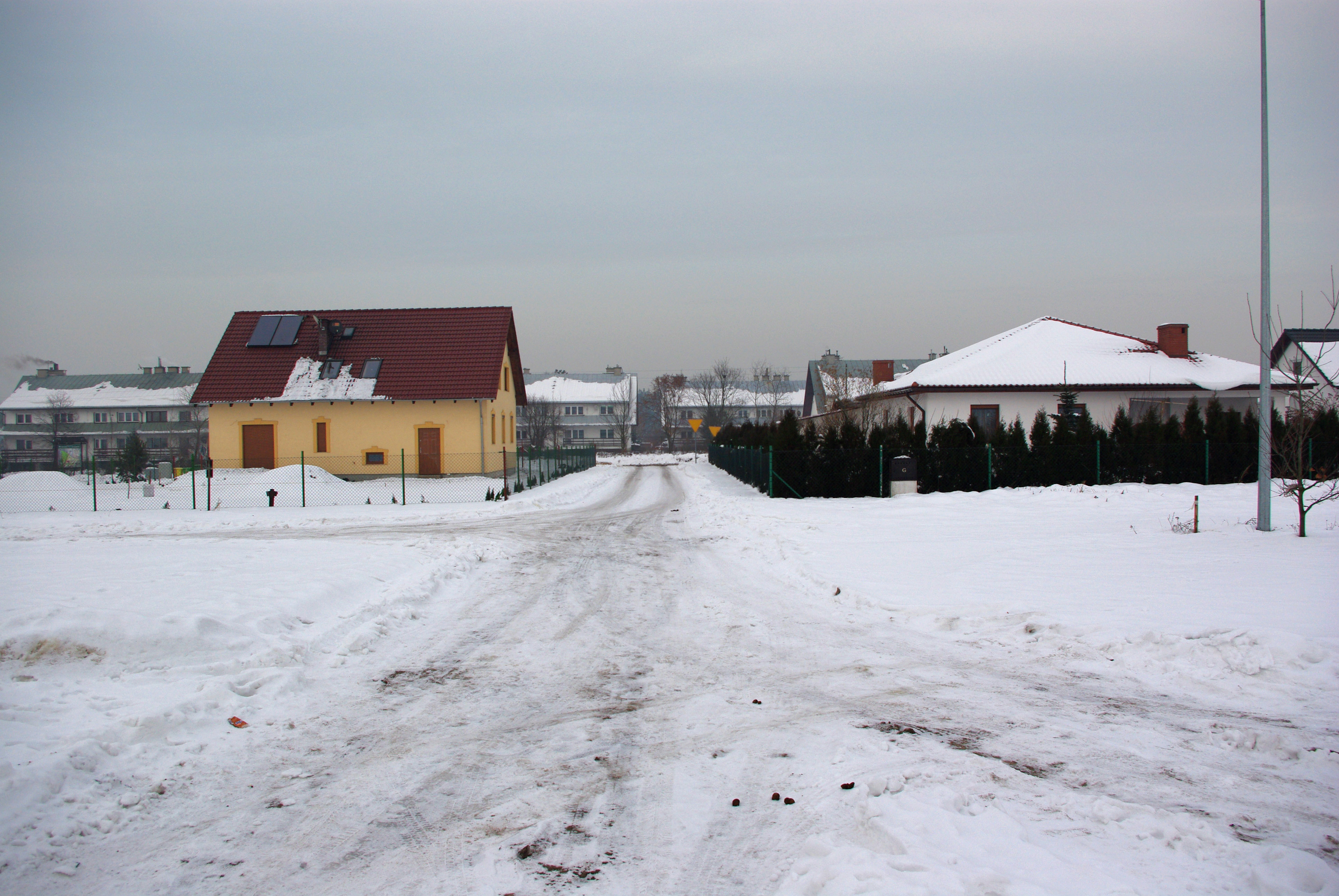 Miejscowość Dobra w woj.Dolnośląskim